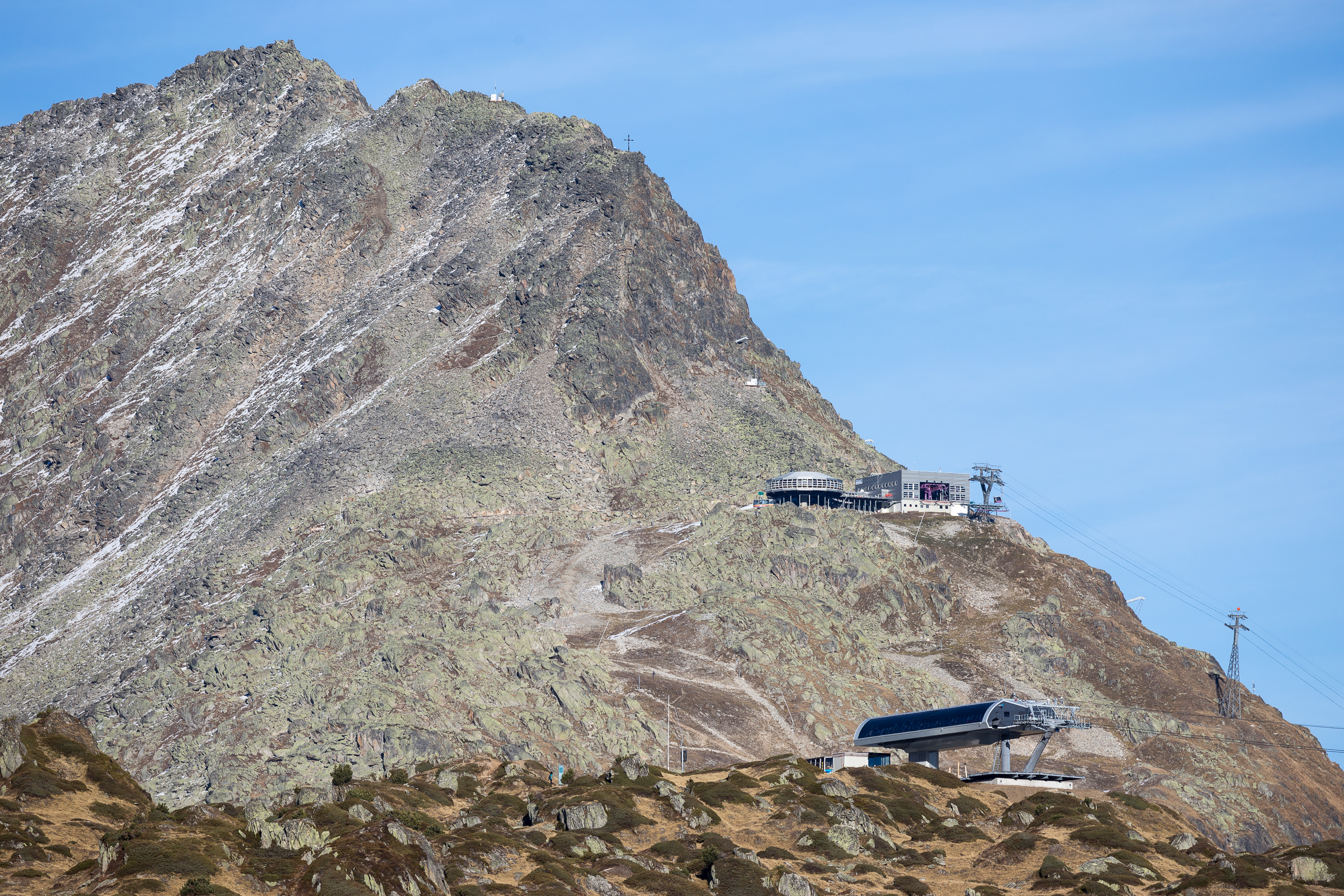 Bettmerhorn mit Bergstation der Gondelbahn, im Vordergrund Bergstation Moosfluo